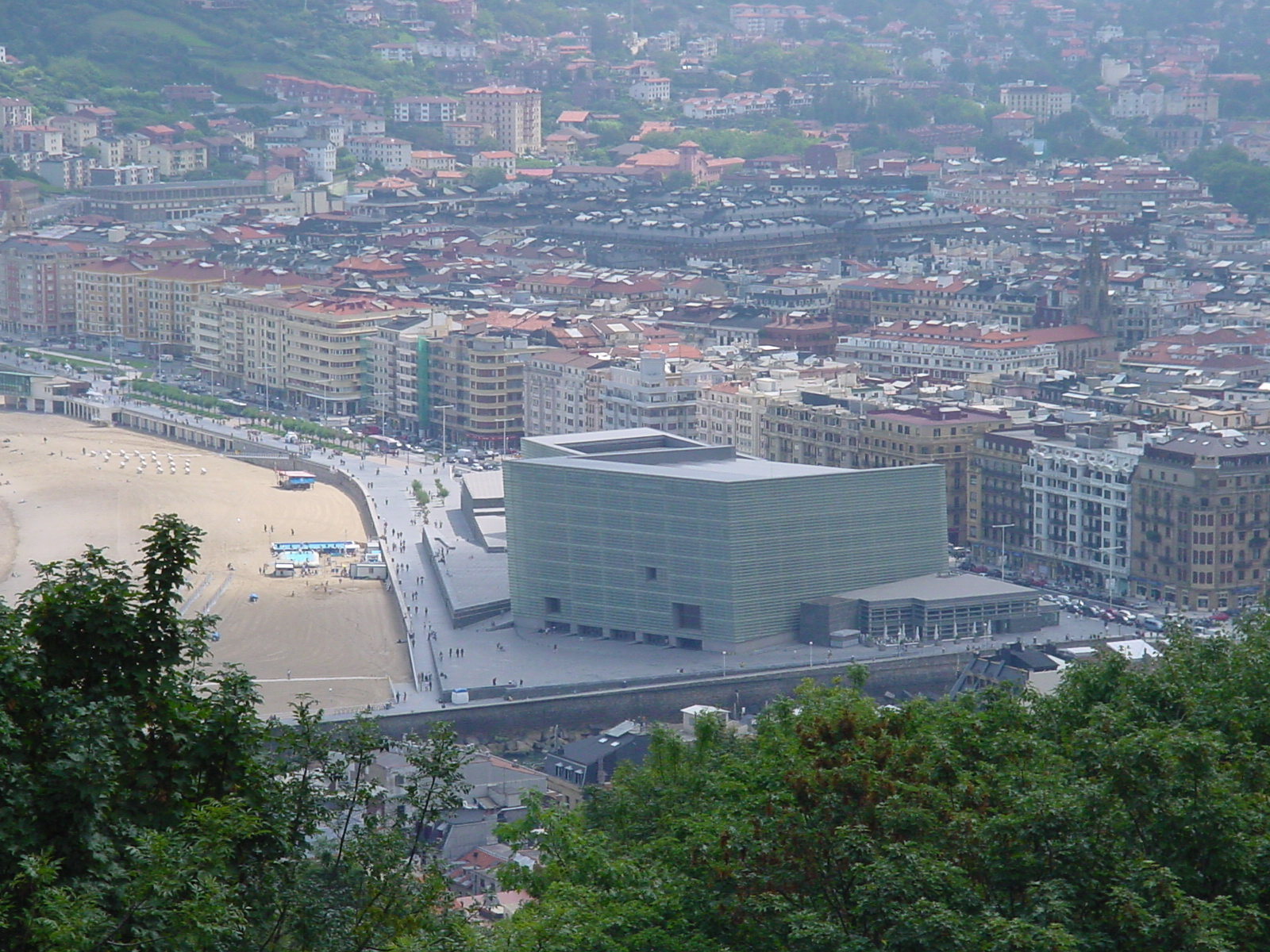 Donostiako (Gipuzkoa, Euskal Herria) Gros auzoa (aurrekaldean, Kursaal jauregia) Urgull menditik.